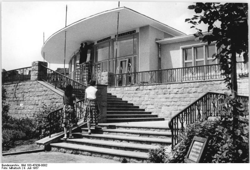 Berlin, Café Zentralbild Mihatsch 9.7.57 Neues Terrassen-Cafe im Herzen Berlins. Eine Oase im Häusermeer des Berliner Stadt Bezirks Mitte ist die herrliche Anlage des Volksparkes am Weinberg. Die hier Erholung suchenden Berliner werden bald von dem neuen Terrassen-Cafe aus einen schönen Rundblick über die Parkanlage genießen können. UBz: Blick auf das Terrassen-Cafe das im August seine Pforten öffnen wird.